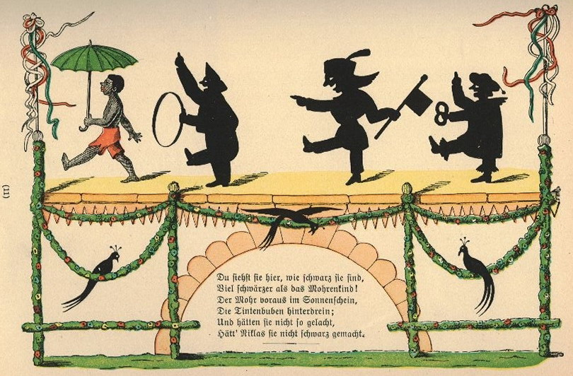 Der Struwwelpeter: Die Geschichte von den schwarzen Buben Tafel 4